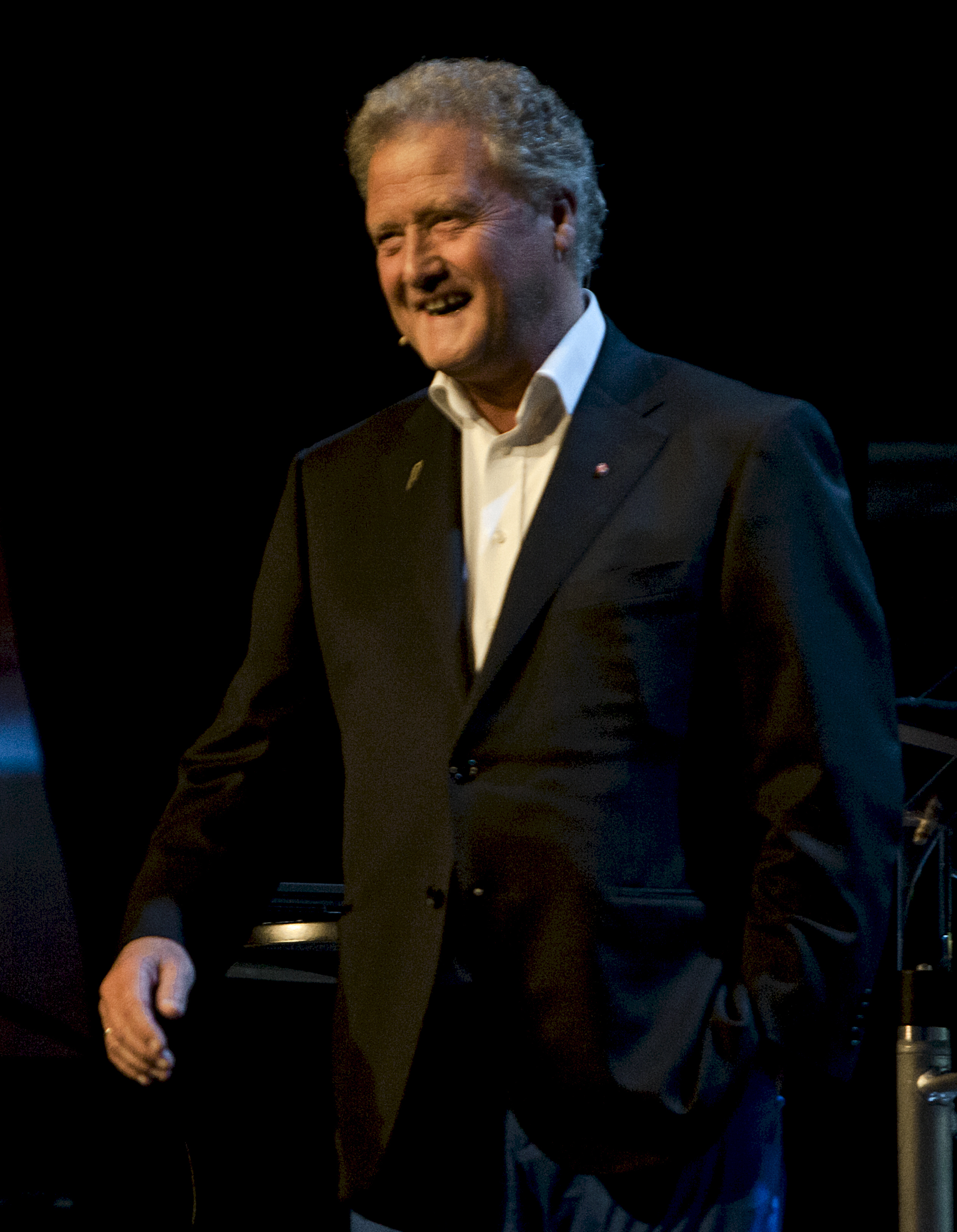 Foto: Jarle H. Moe Nordiske Mediedager